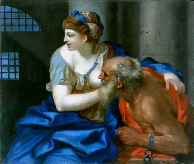 MAHB - Bayeux : Sébastien Bourdon, Charité romaine (XVIIe siècle)